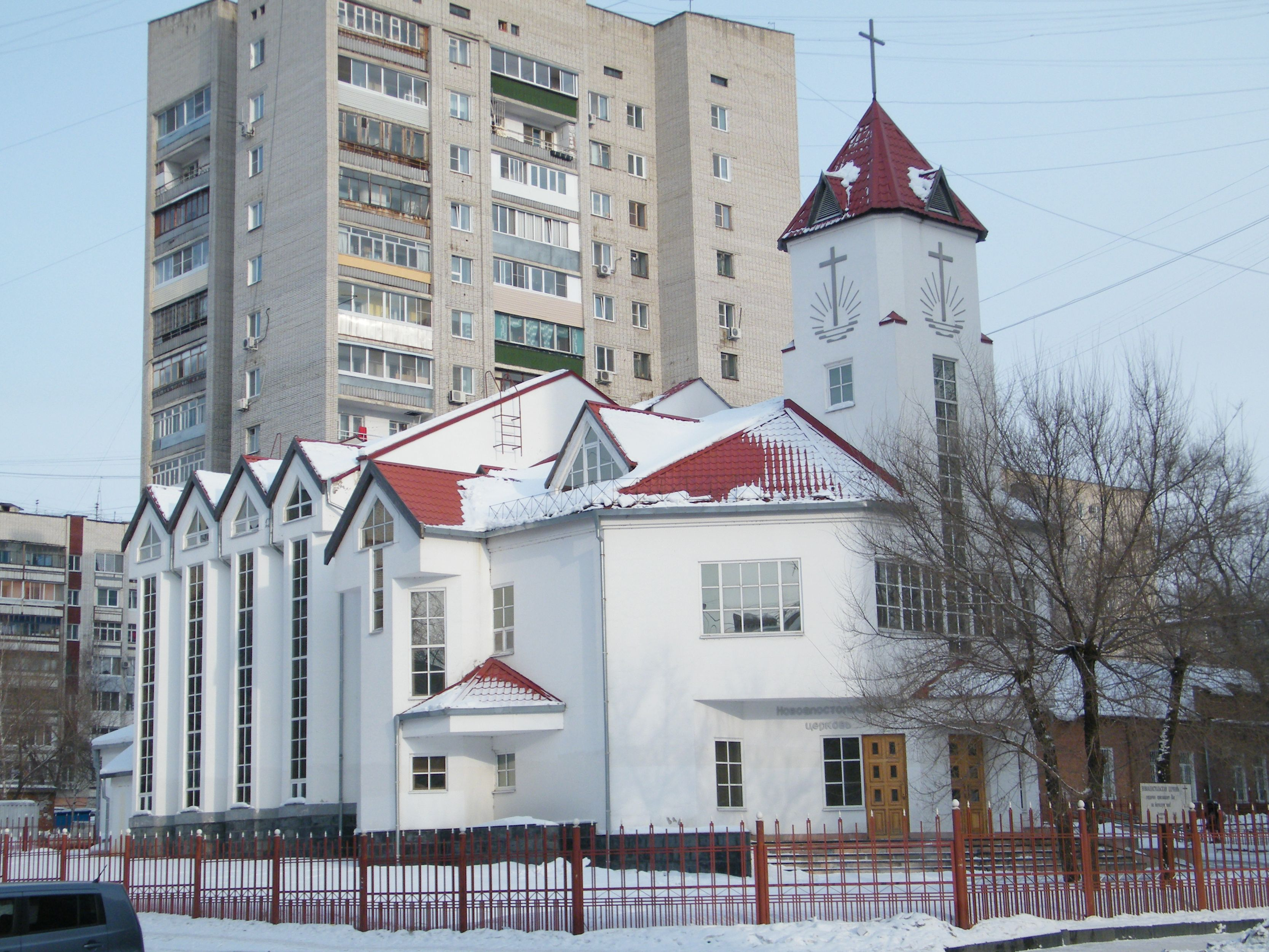 Новоапостольская церковь в Хабаровске